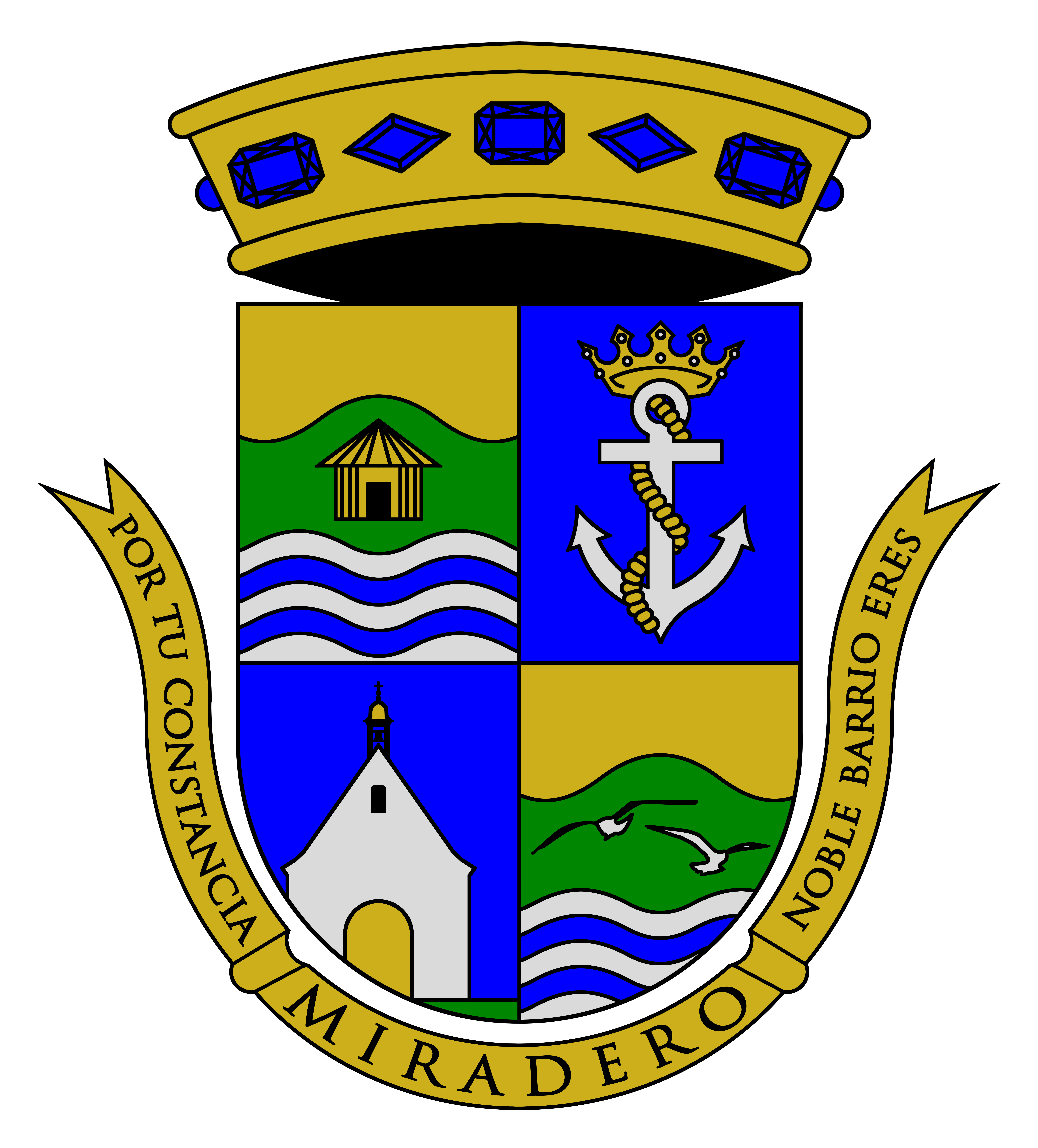 Escudo del Barrio Miradero